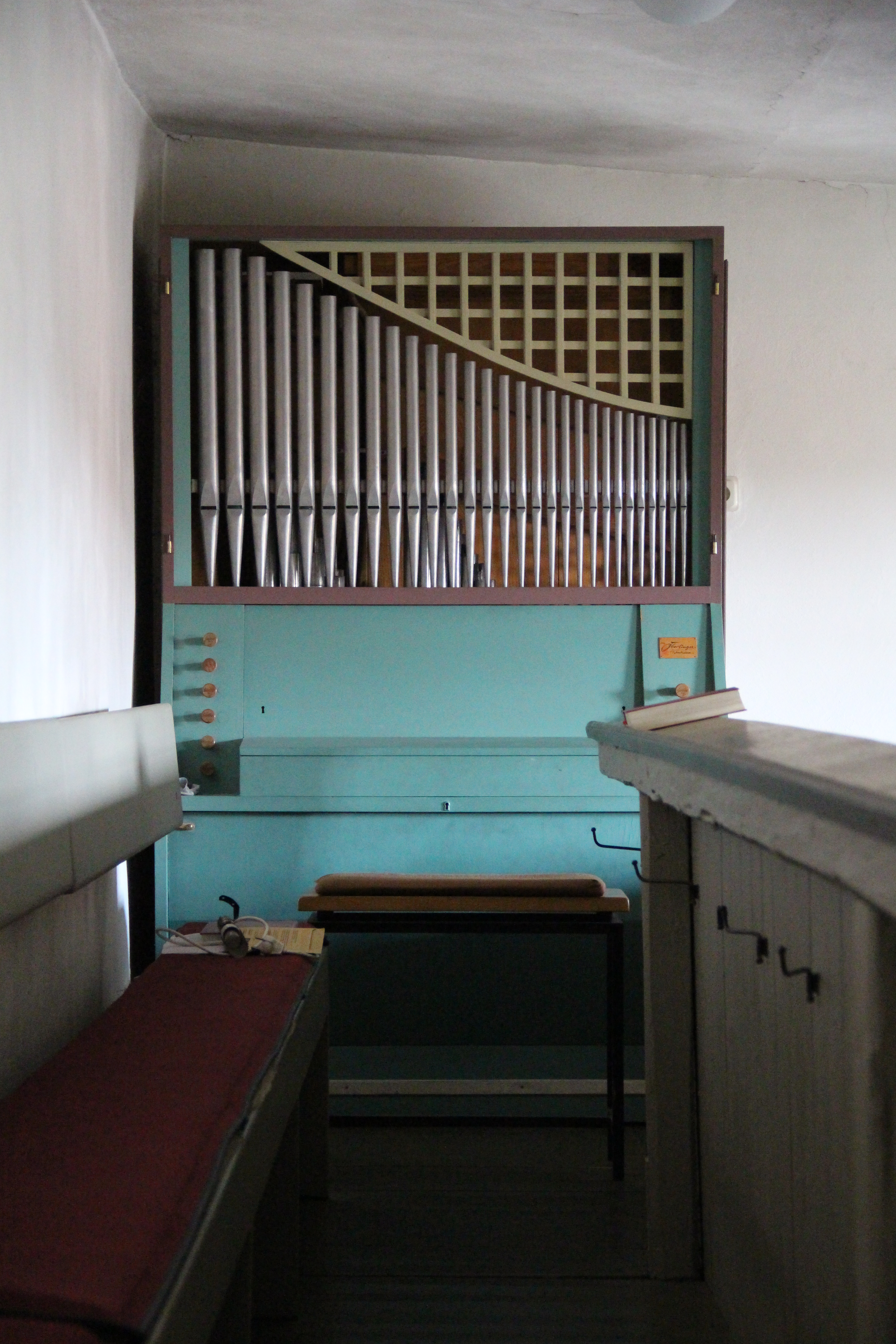 Kirche Mainzlar